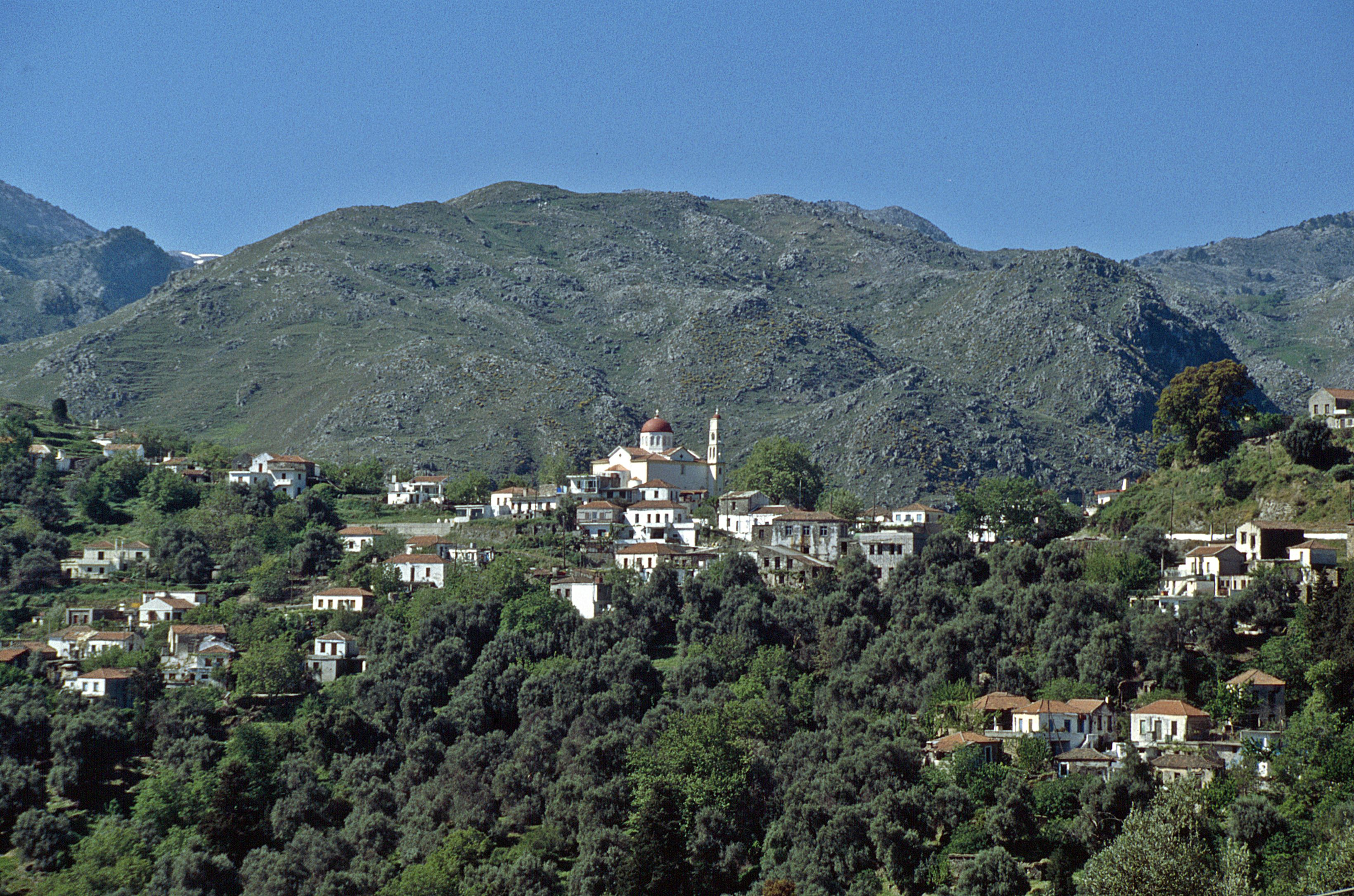 Lakkoi